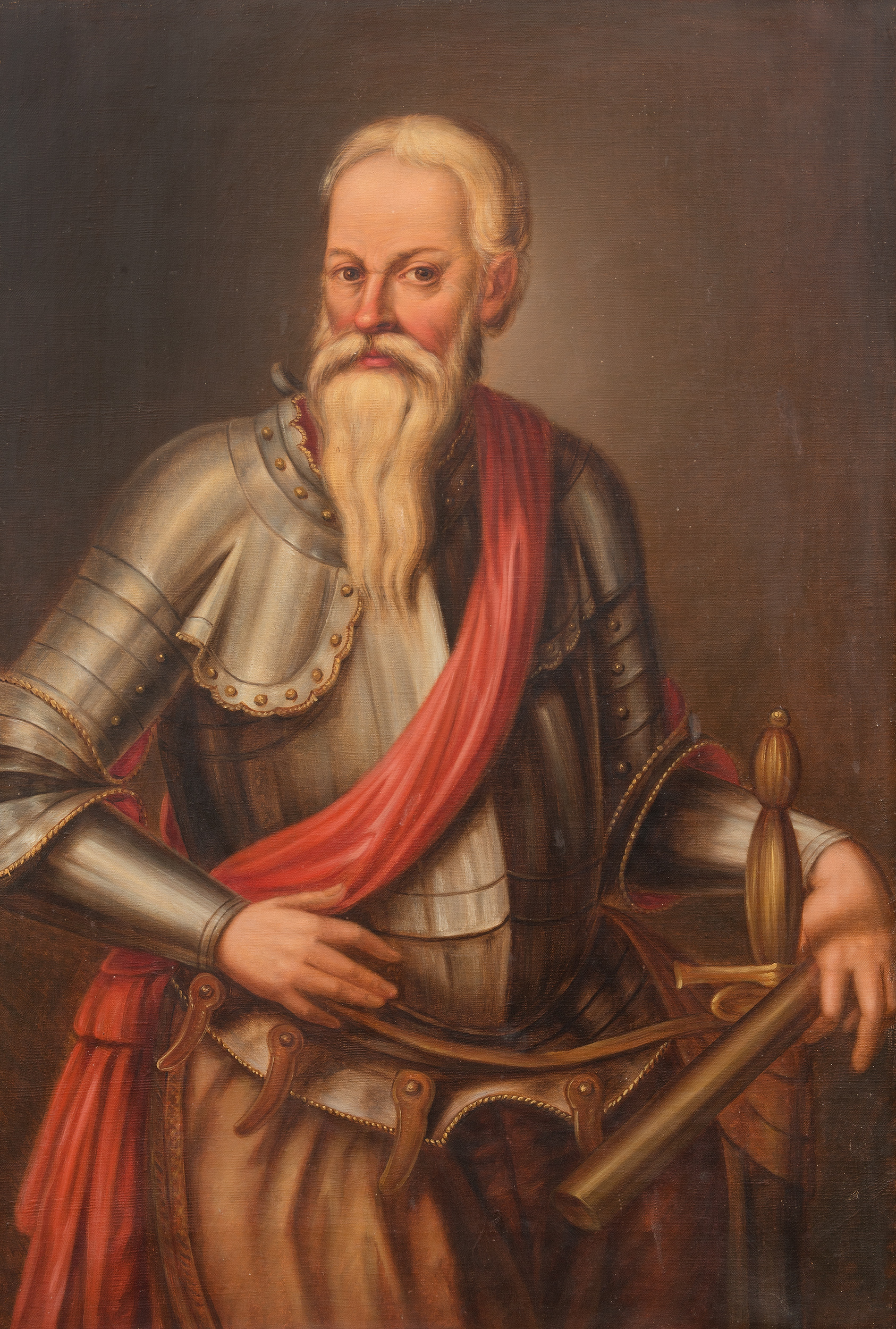 Беларуская (тарашкевіца): Партрэт Мікалая Радзівіла Рудога (Mikałaj Radzivił Rudy)